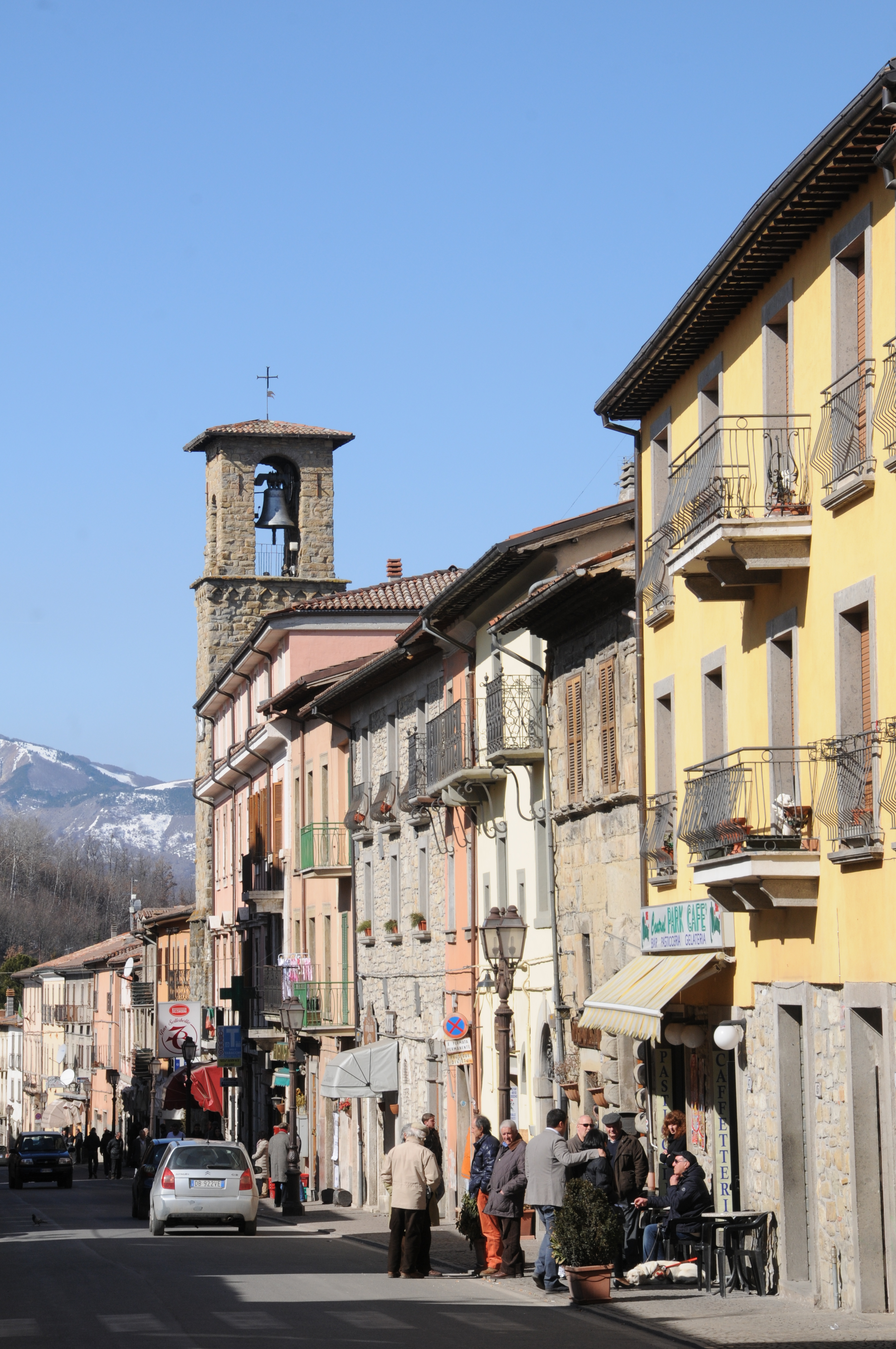 Il Corso di Amatrice, come era...